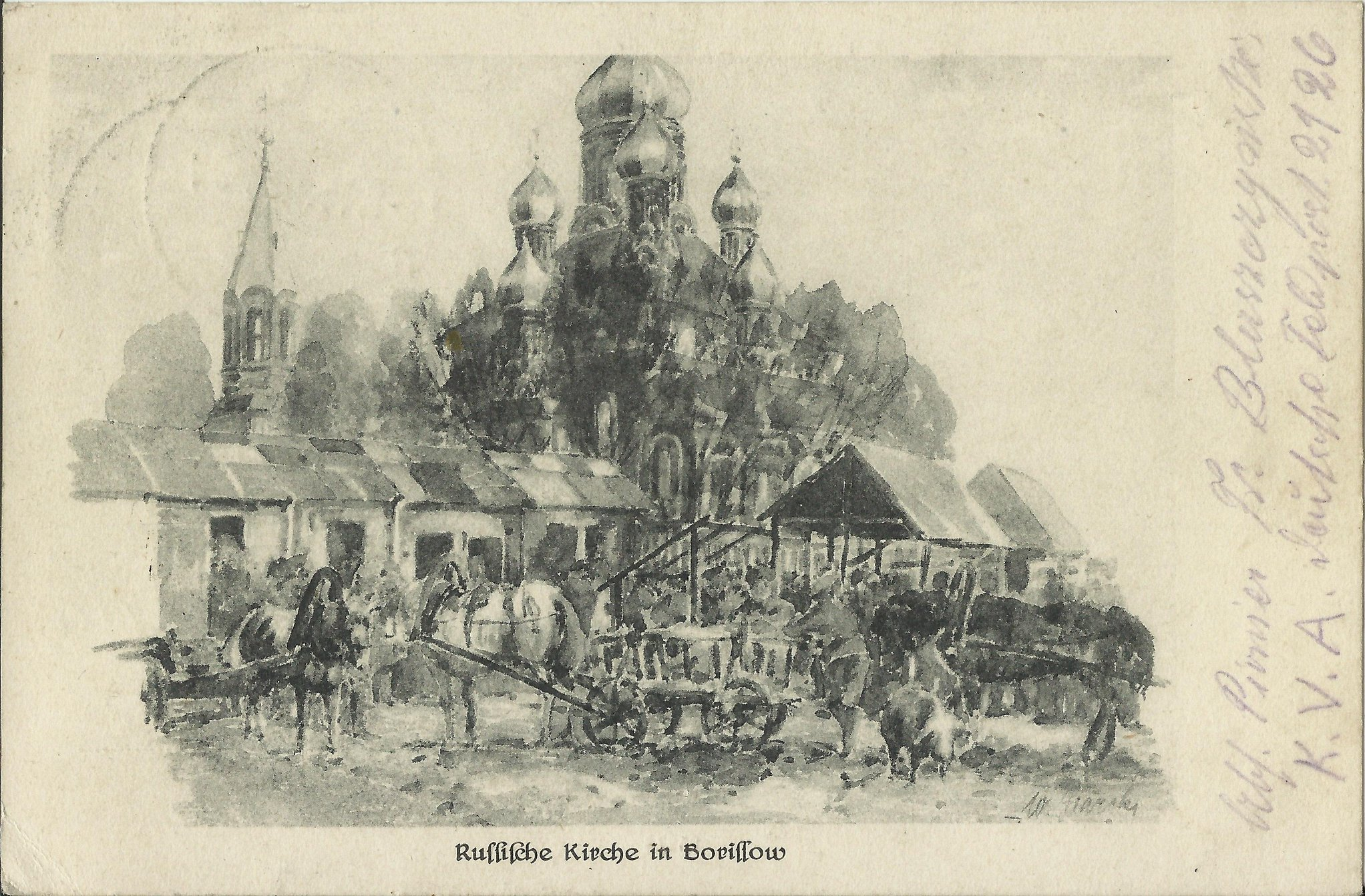 Беларуская (тарашкевіца): Барысаў (Barysaŭ), пляц Рынак (plac Rynak). Царква-мураўёўка